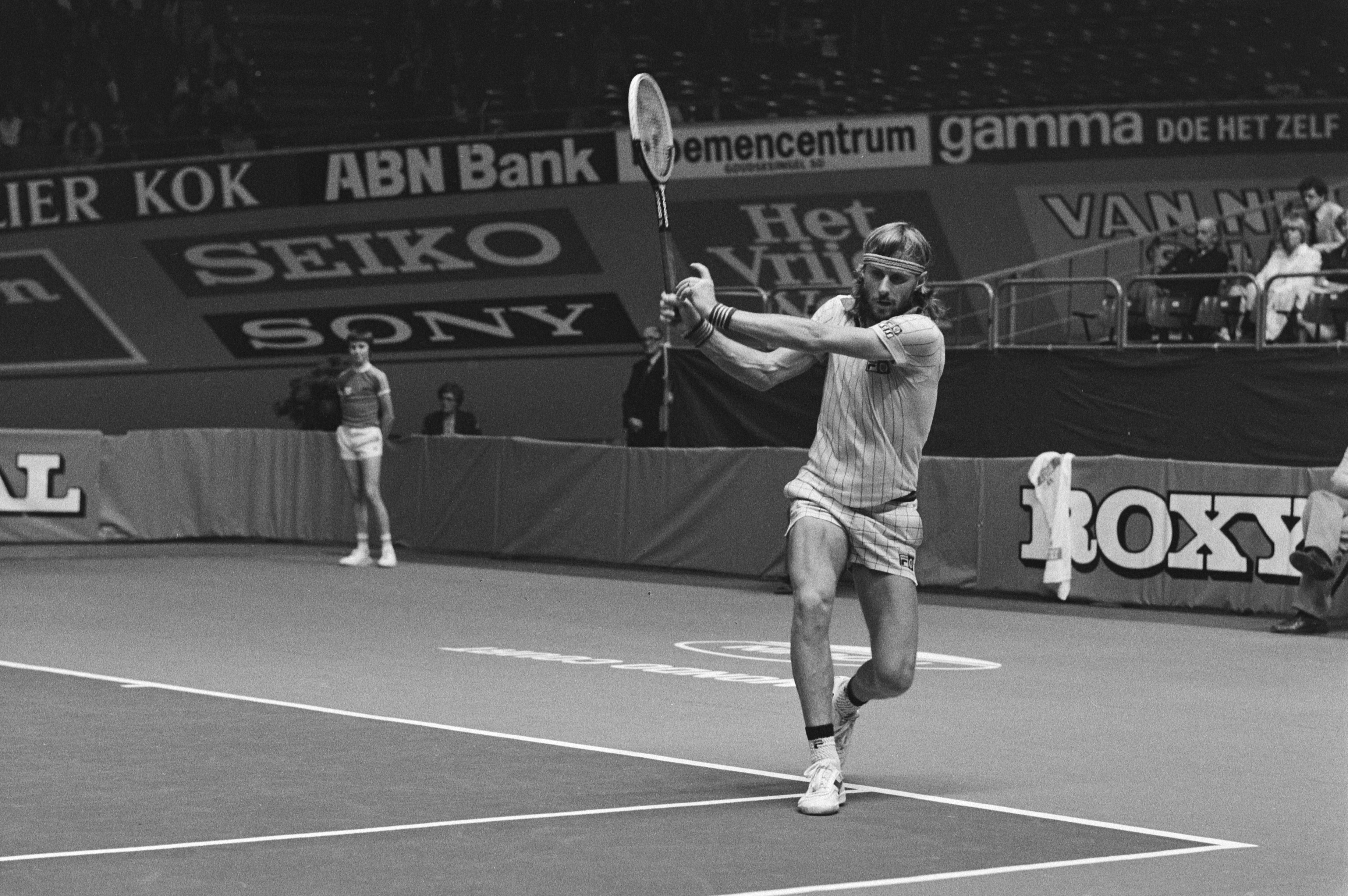 Collectie / Archief : Fotocollectie Anefo Reportage / Serie : Finale van het internationale proftenniscircuit in de Ahoy te Rotterdam Beschrijving : Winnaar Bjorn Borg in actie Datum : 7 oktober 1979 Locatie : Rotterdam, Zuid-Holland Trefwoorden : sport, tennis Persoonsnaam : Borg, Björn Instellingsnaam : Ahoy Fotograaf : Croes, Rob C. / Anefo Auteursrechthebbende : Nationaal Archief Materiaalsoort : Negatief (zwart/wit) Nummer archiefinventaris : bekijk toegang 2.24.01.05 Bestanddeelnummer : 930-4795